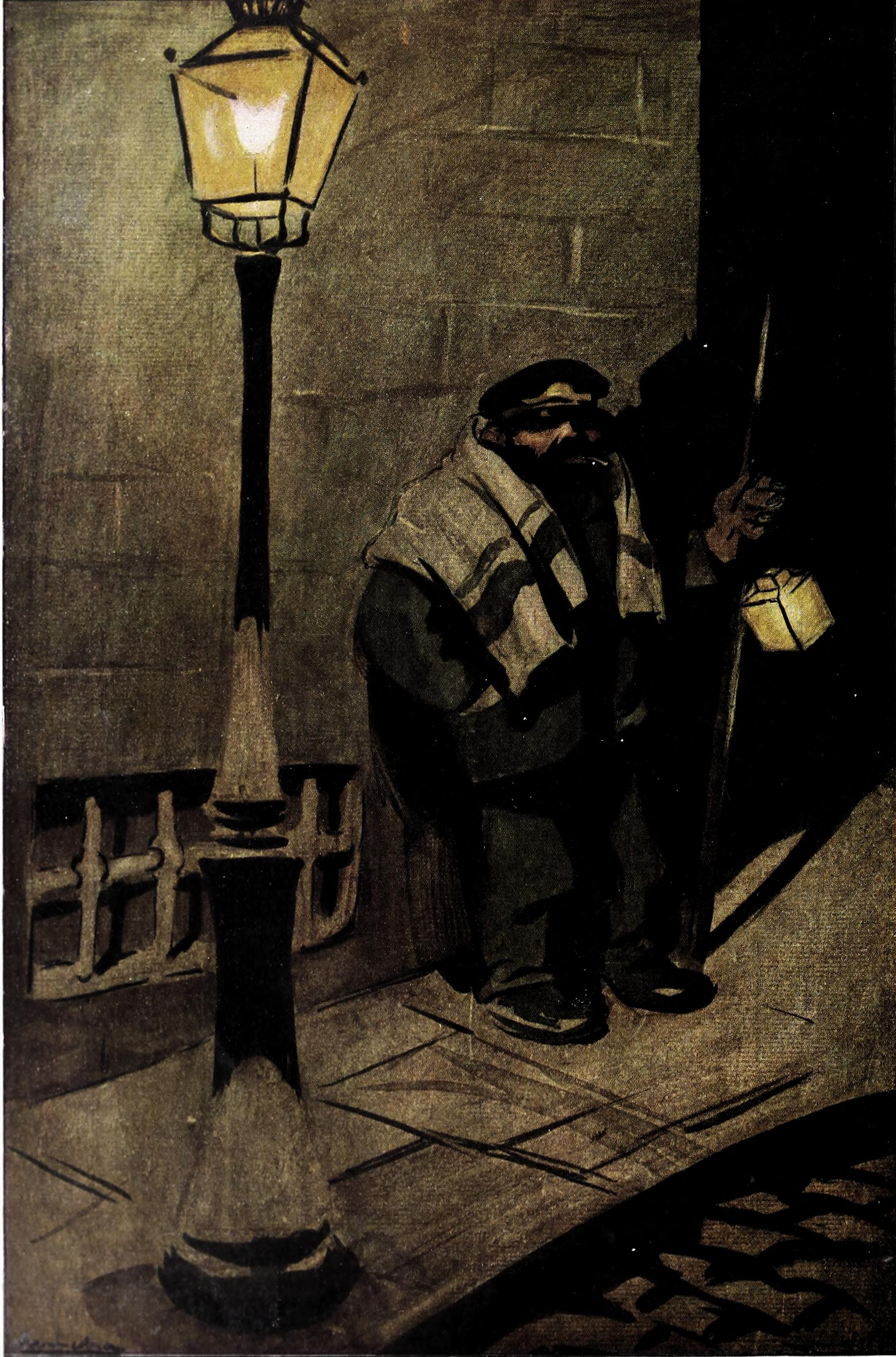 Escenas Madrileñas. El descanso del sereno, por Sancha.